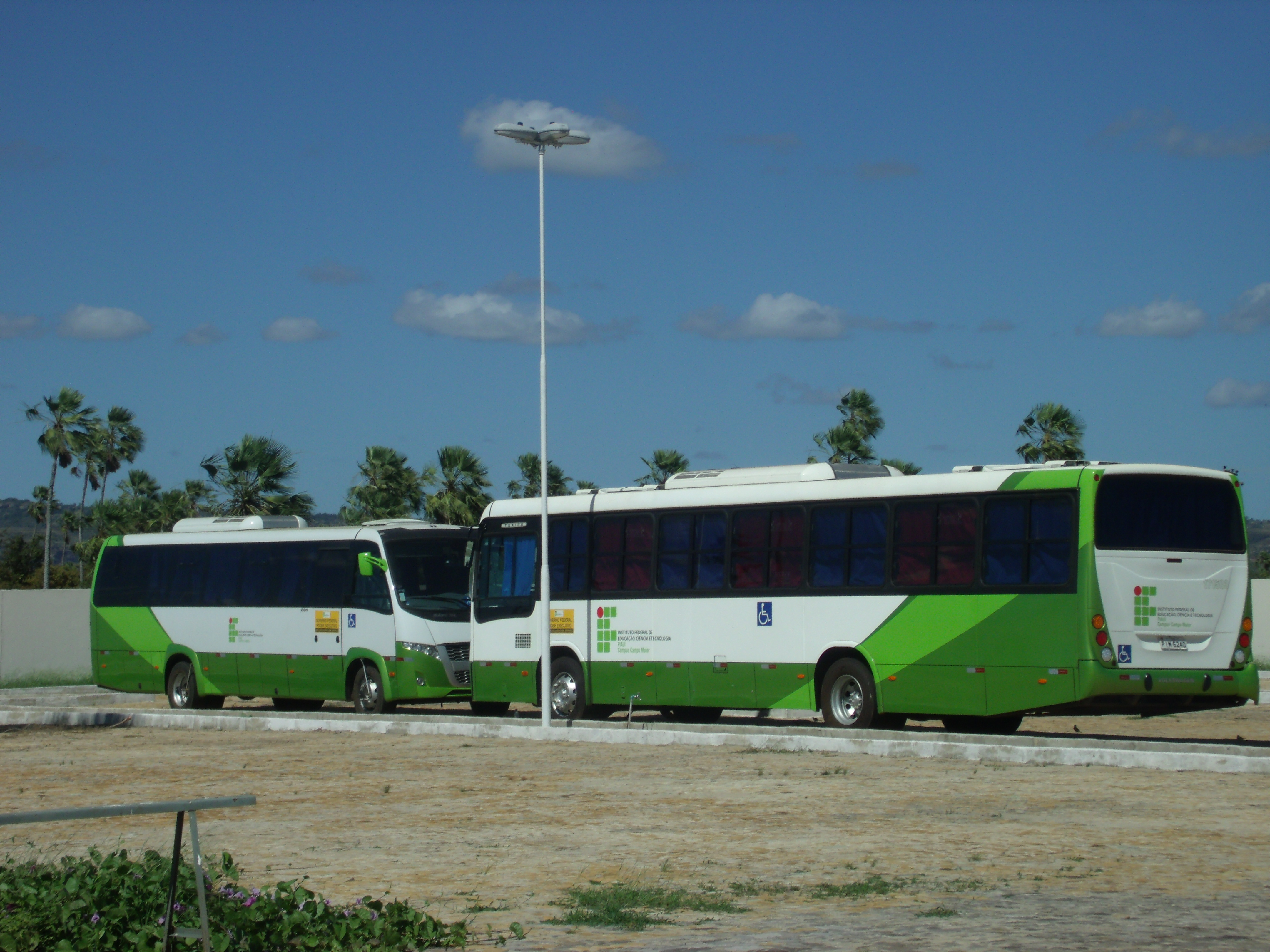 ônibus do do IFPI do Piauí